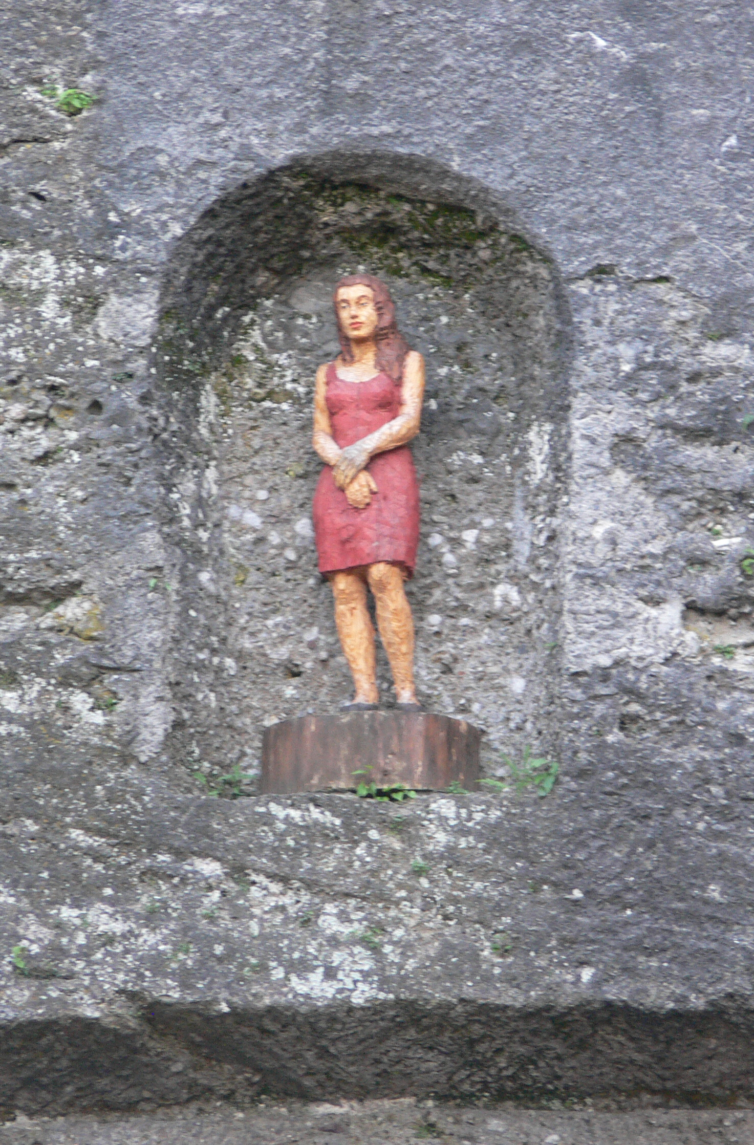 Skulptur "Frau im Fels" von Stephan Balkenhol im Toscaninihof (südlicher Abschluss des Salzburger Festspielhauskomplexes); aufgestellt im Rahmen des "Kunstprojekts Salzburg 2007" der Salzburger Festspiele